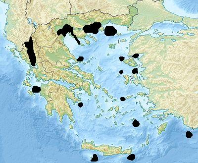 Εξερεύνηση πετρελαίου στην Ελλάδα. Μόνο το πεδίο της Θάσου εκμεταλλεύεται, επίσης, υπάρχει φυσικό αέριο. Αυτός ο χάρτης έχει τροφοδοτηθεί με πληροφορίες από την ελληνική ηλεκτρονική εφημερίδα AegeanTimes.GR [1]